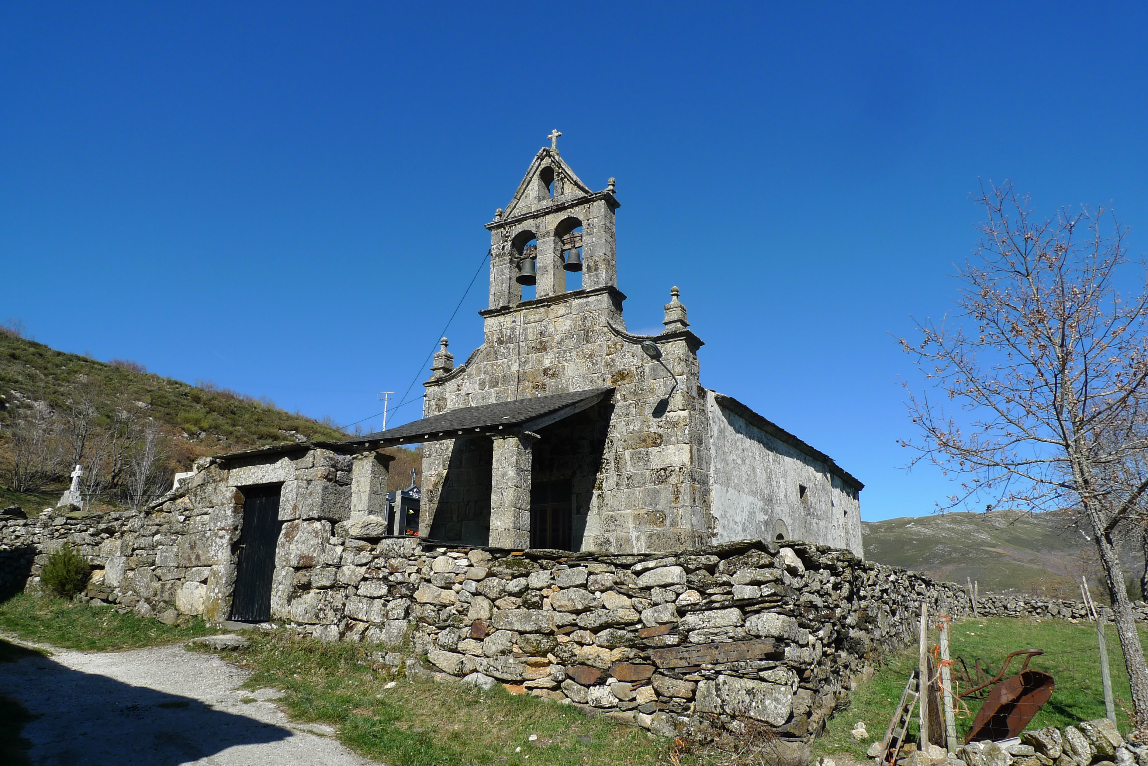 igrexa de Santa María Madanela de Requeixo (Chandrexa de Queixa - Ourense)